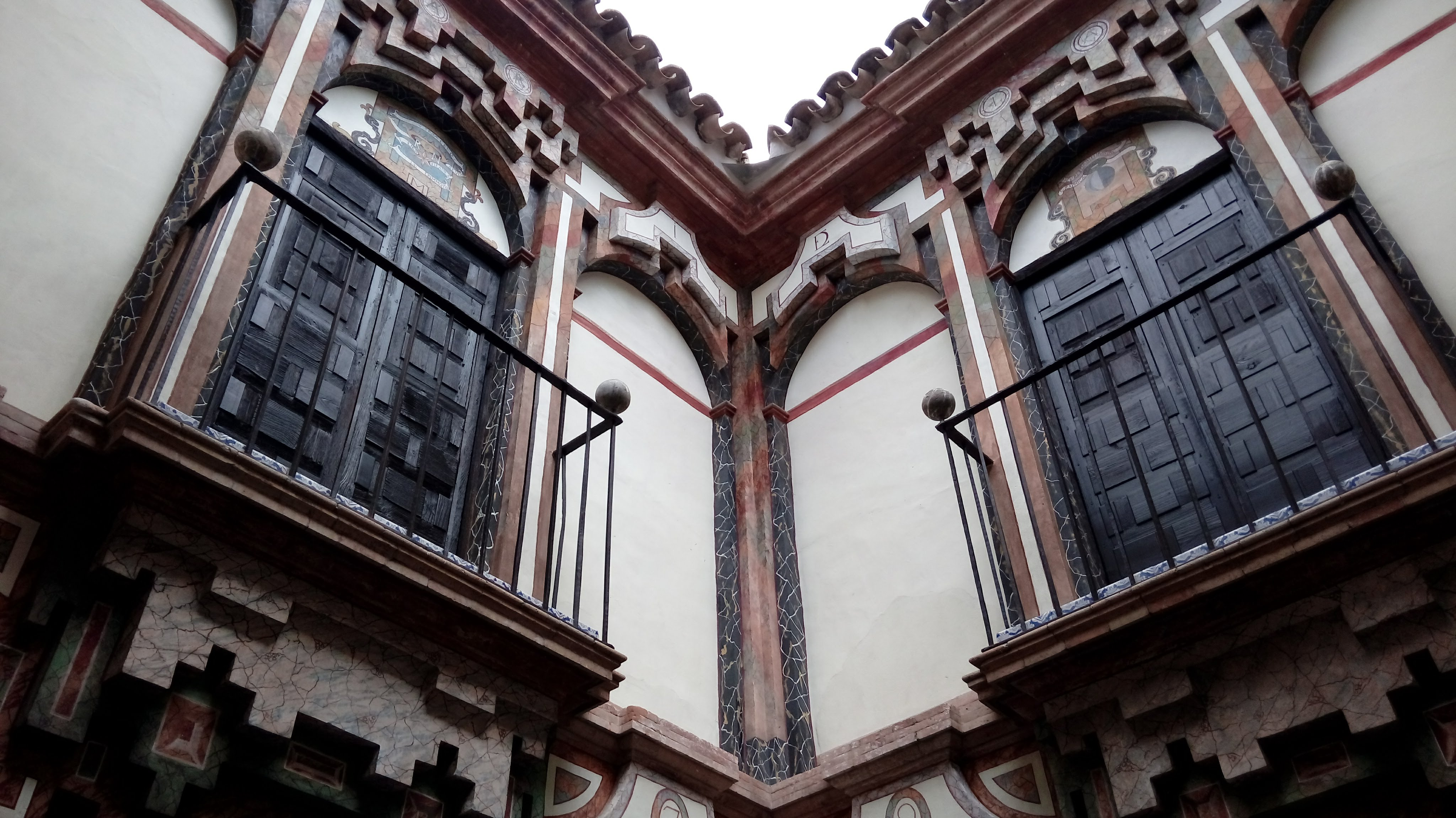 Palacete Barroco del Convento de la Cruz (Córdoba)